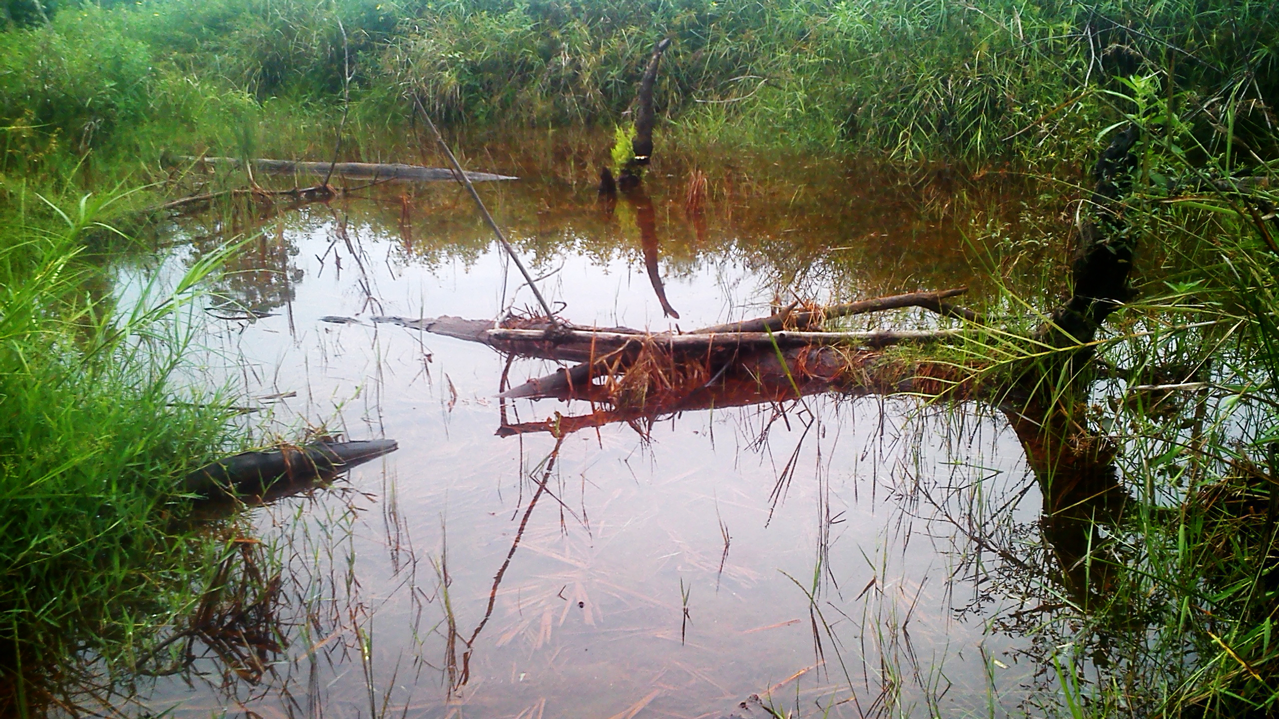 Betta falx habitat, Dente Teladas, Tulang Bawang, Lampung, Indonesia.